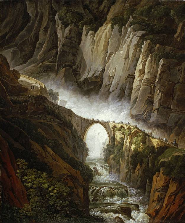 Die Teufelsbrücke, 1824, Aquarell von Peter Birmann (Pierre), 1768-1844